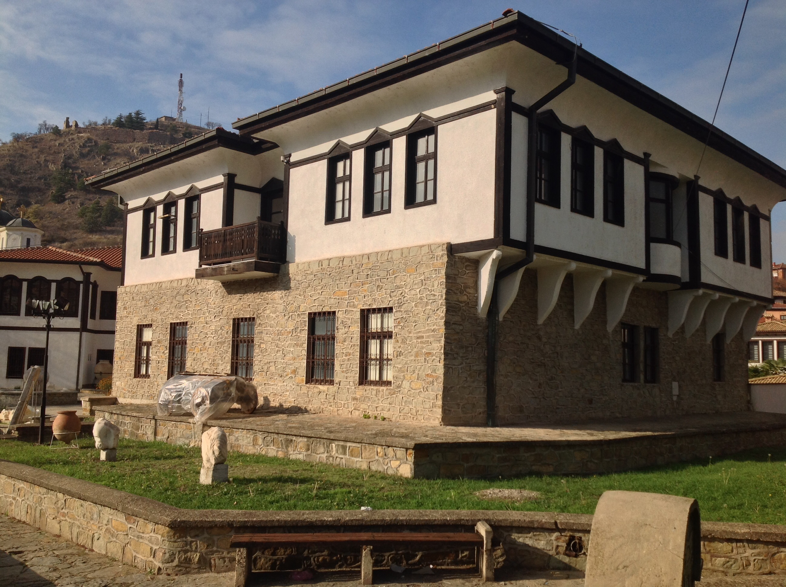 Музејот во Штип е отворен со одлука на Народниот одбор на градот Штип на 10.5.1950 година. Денес музејскиот комплекс се состои од три згради од кои едната е административна, а другите две се предвидени како поставки.